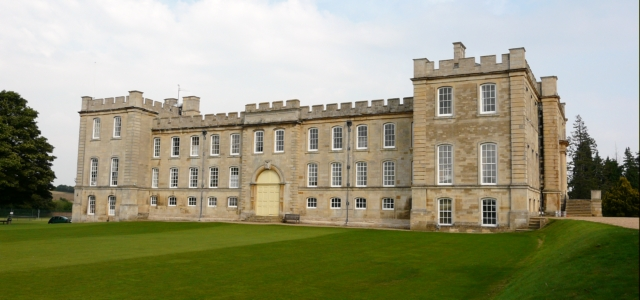 Kimbolton